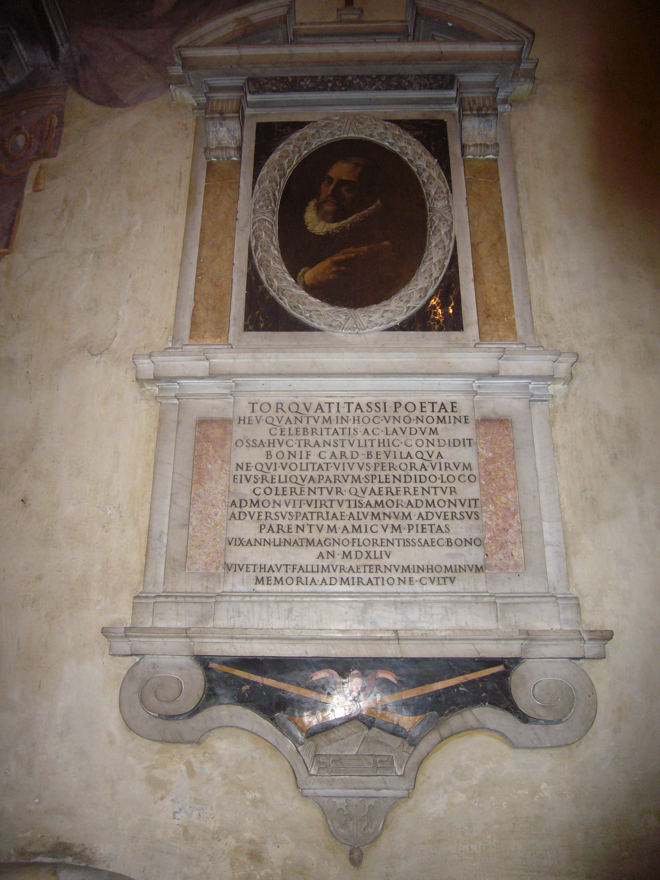 Roma, Sant'Onofrio al Gianicolo: tomba di Torquato Tasso